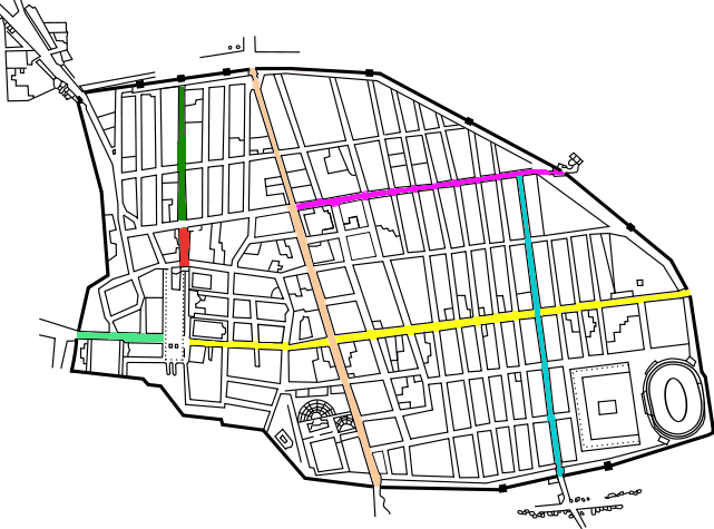 Les principaux axes de la ville Via Marinia Via dell'Abondanza Via di Porta Nocera Via di Nola Via di Stabia Via di Mercurio Via del Foro.